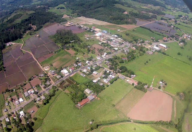 Vista aérea da cidade de Mampituba/RS